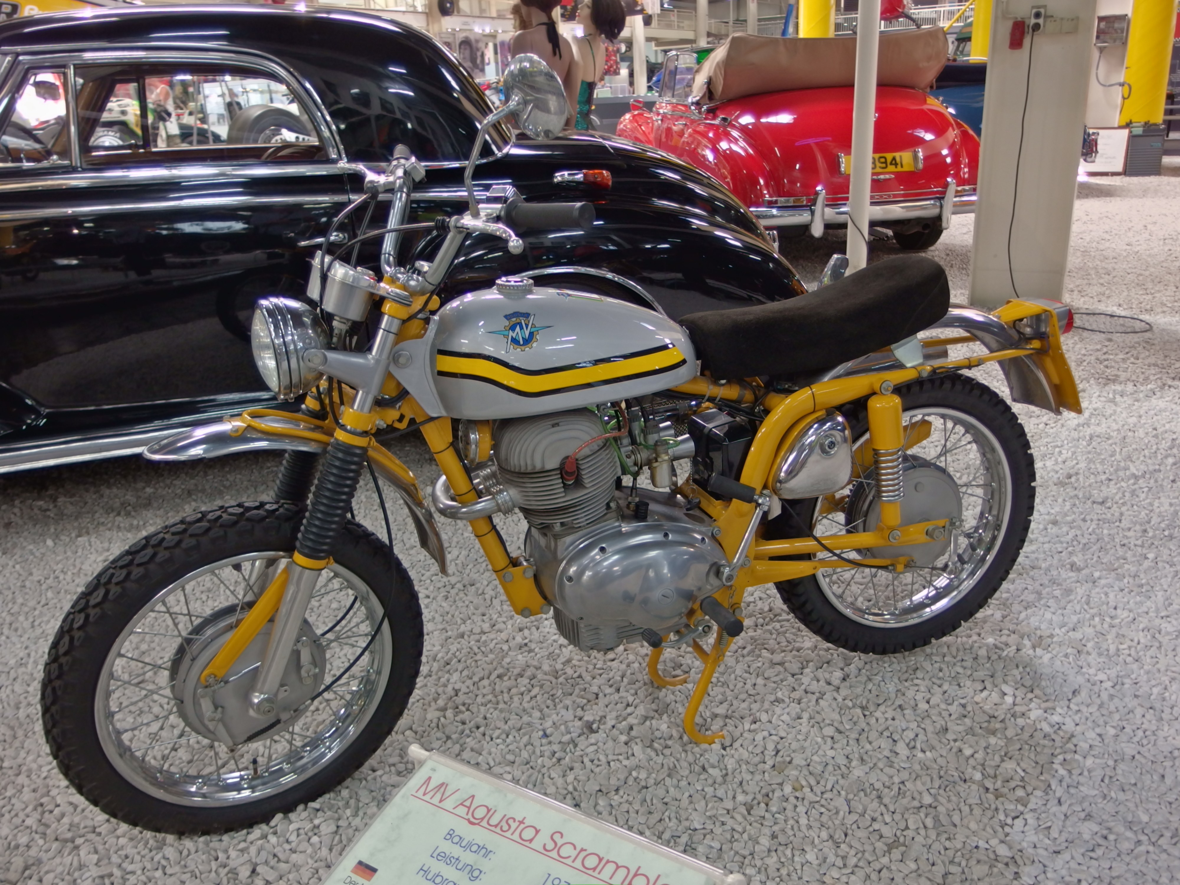 Auto- und Technikmuseum Sinsheim